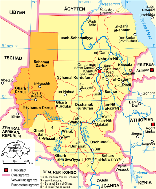 Politische Karte des Sudan (Region Darfur)